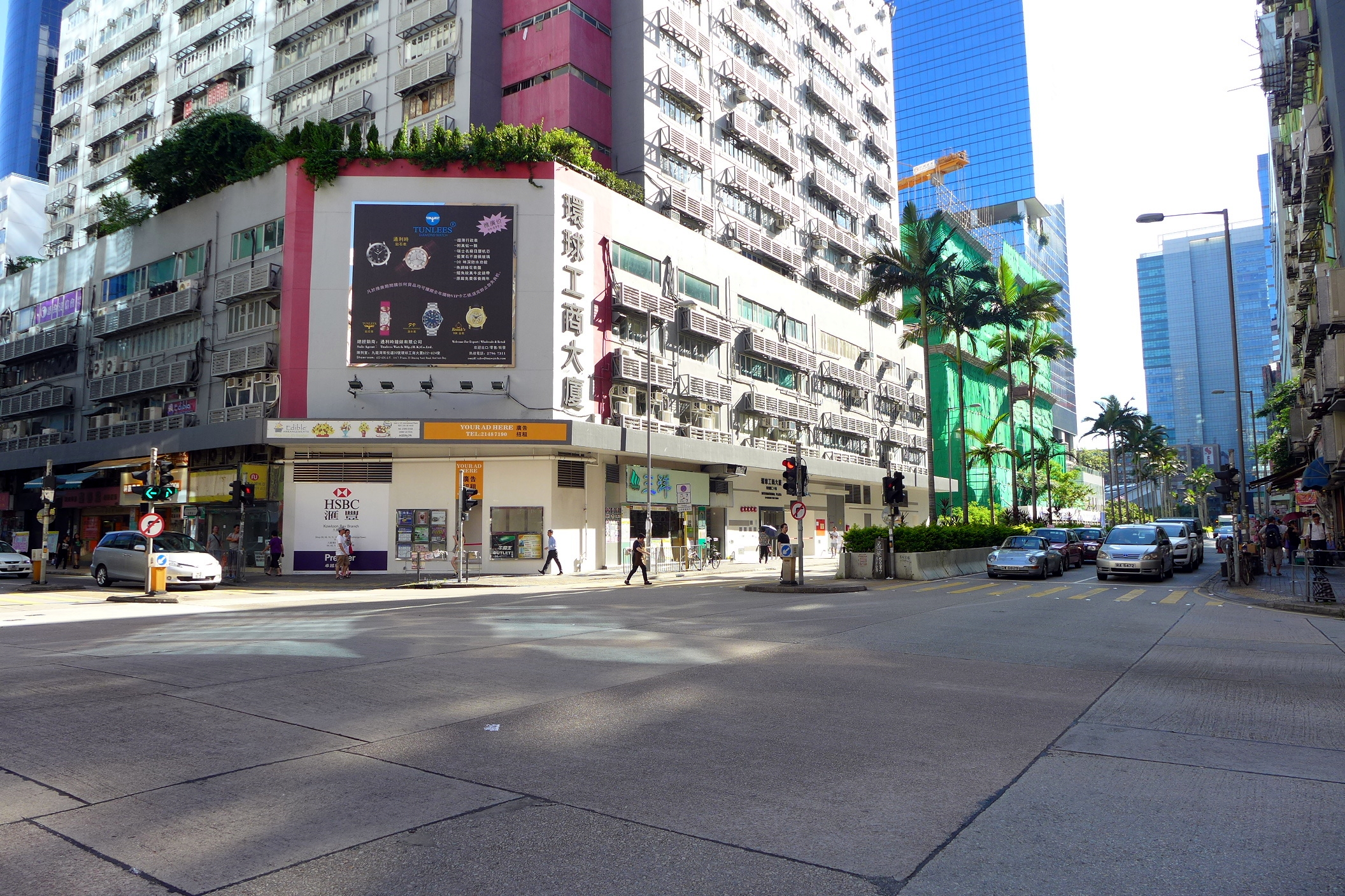 Sheung Yuet Road